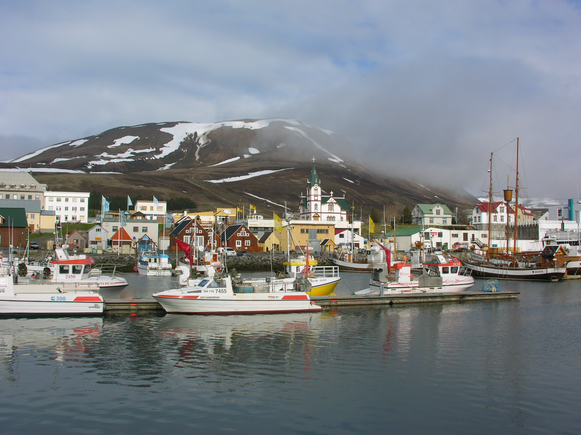 Iceland, Húsavík